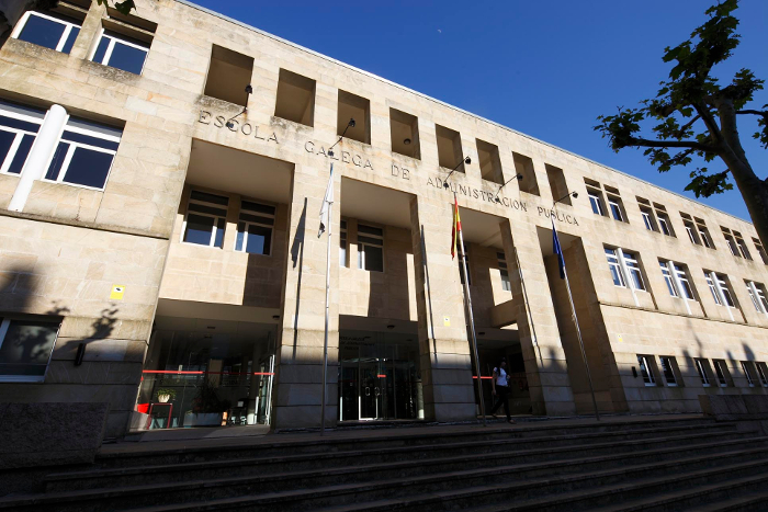 Sede da Escola Galega de Administración Pública en Santiago de Compostela